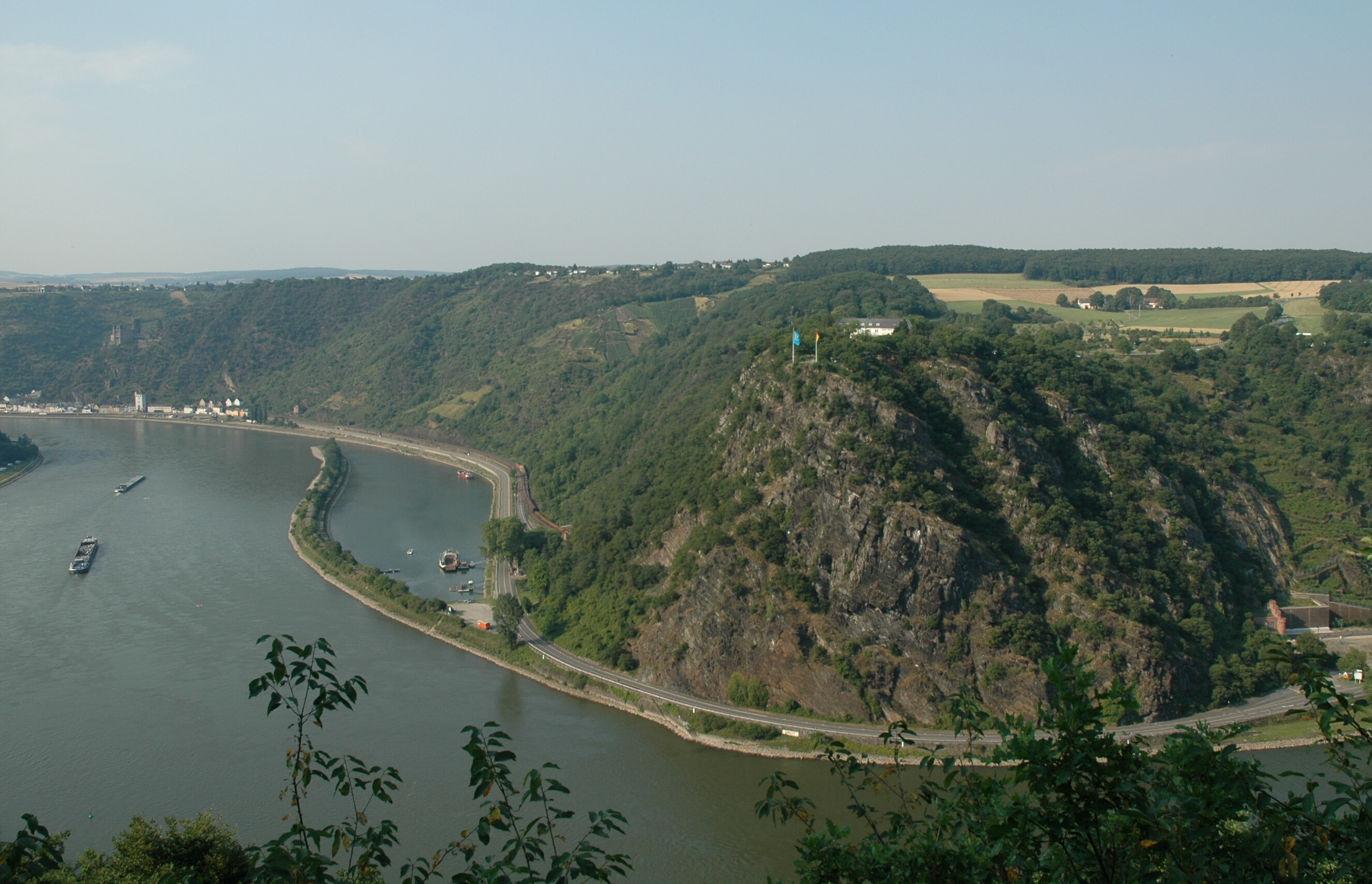 Loreley und Rheintal mit Blick auf St. Goarshausen